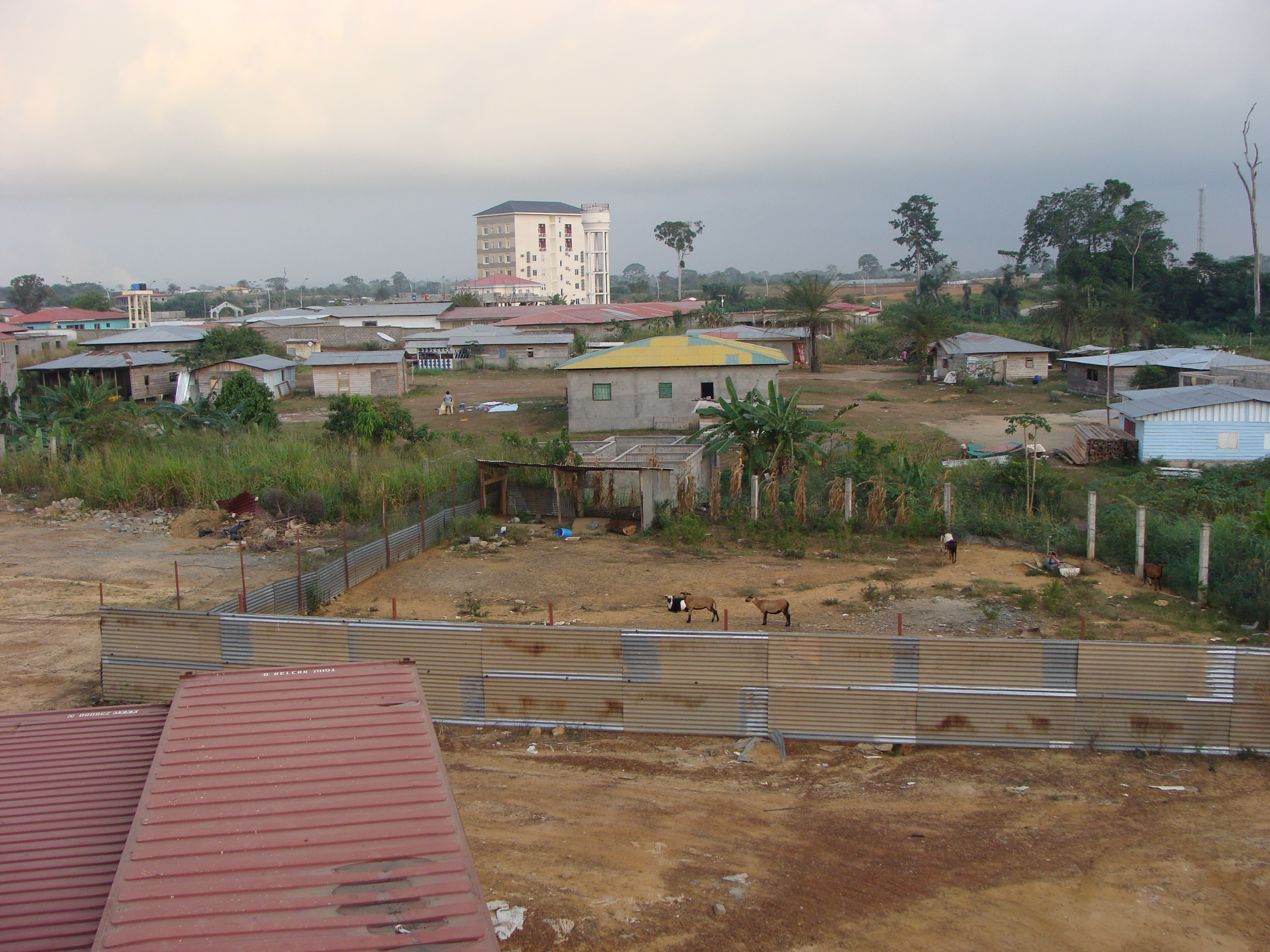 Fotografie der unmittelbaren Umgebung des Centro Médico La Paz in Bata, Äquatorialguinea